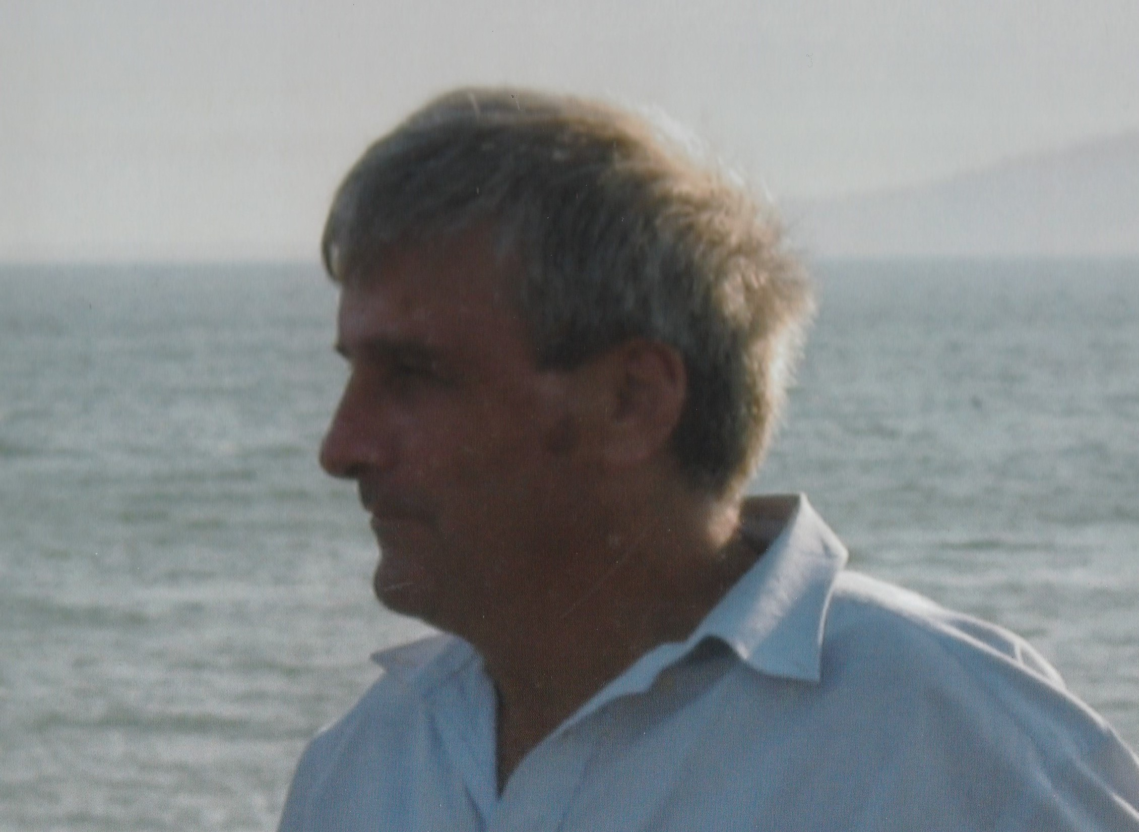 יצחקי גל ראש מנהלת הכנרת